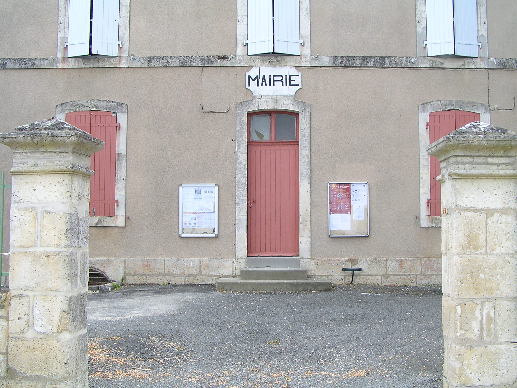 mairie de Bessé